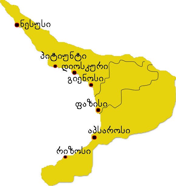 კოლხეთის სამეფო